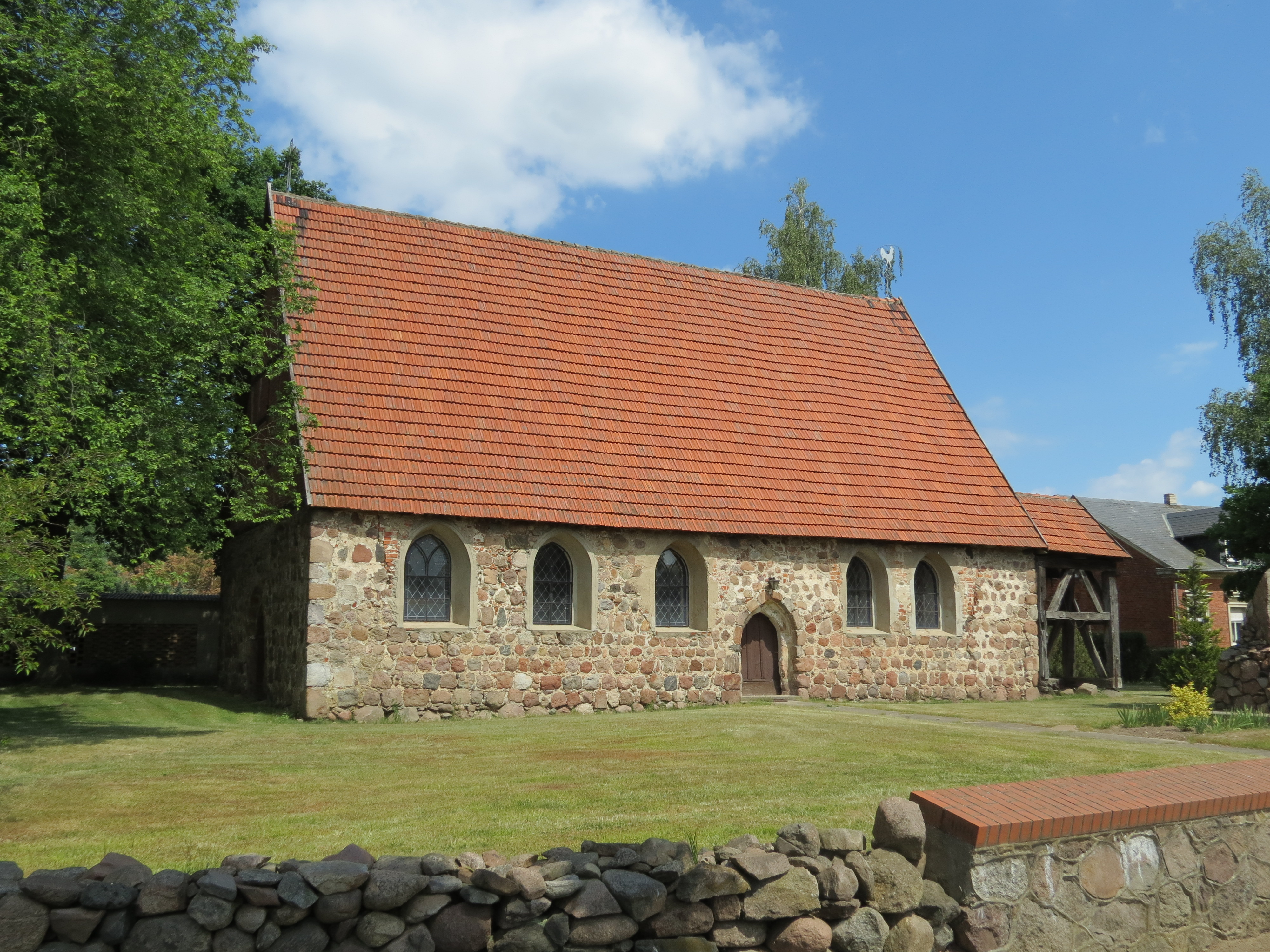 Dorfkirche Triglitz, Lkr. Prignitz, Brandenburg, Deutschland, Südseite